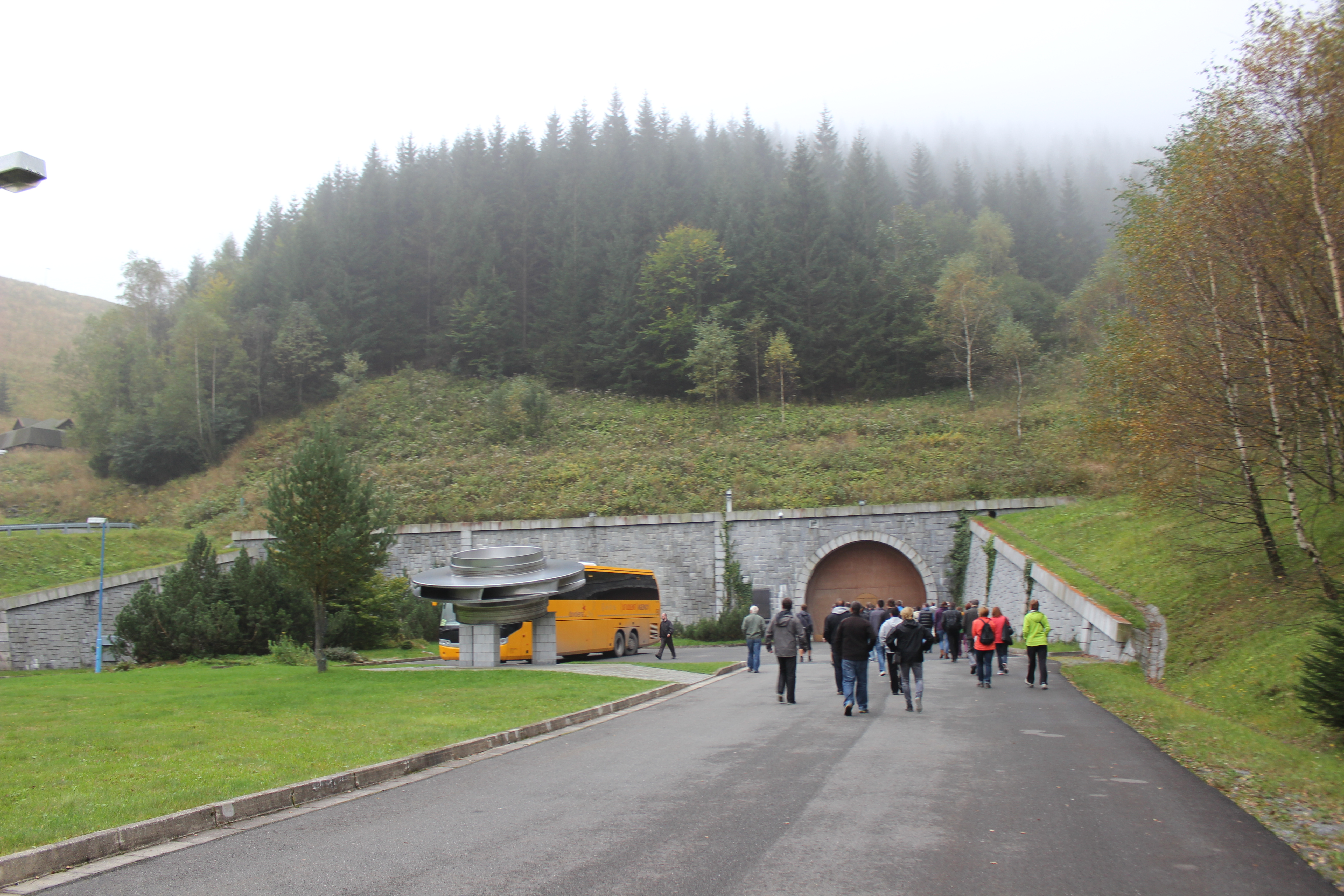 Vstupní tunel do zázemí přečerpávací hydroelektrárny Dlouhé Stráně.